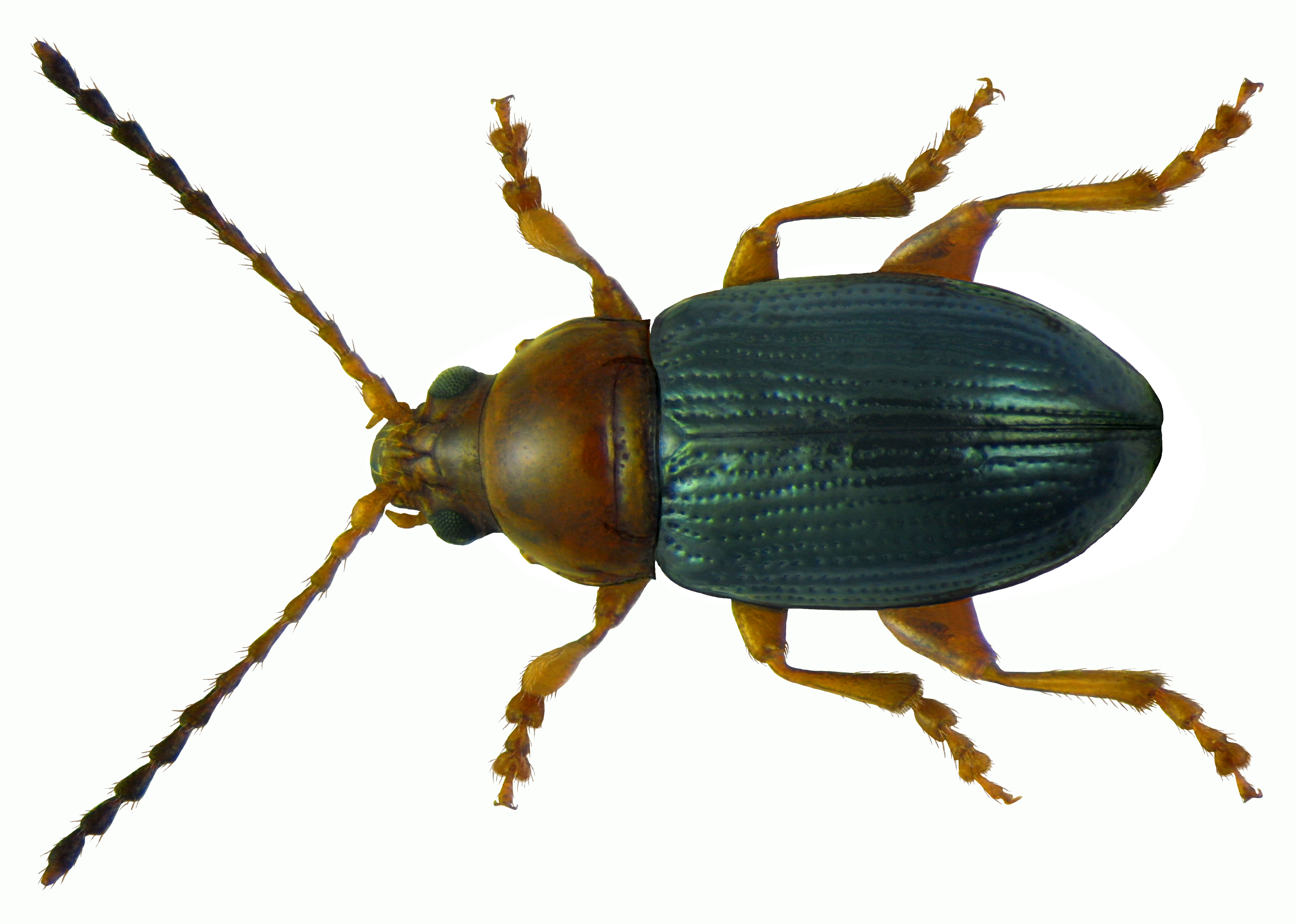 Derocrepis rufipes (Linné, 1758) Familie: Chrysomelidae Groesse: 2,8-3,8 mm Verbreitung: Europa Oekologie: auf Papilionaceen Fundort: Germania, Bayern, Oberfranken, Kulmbach leg.det. U.Schmidt, 1972 Photo: U.Schmidt, 2011